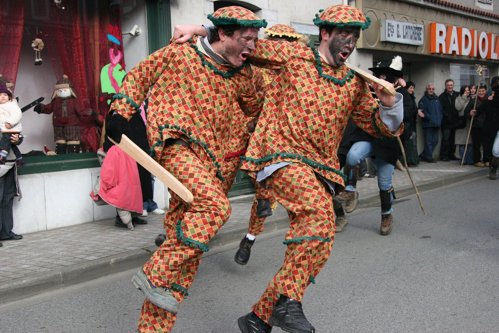 Mauleko maskaradak. 2007ko otsailak 3. Buhamiak.